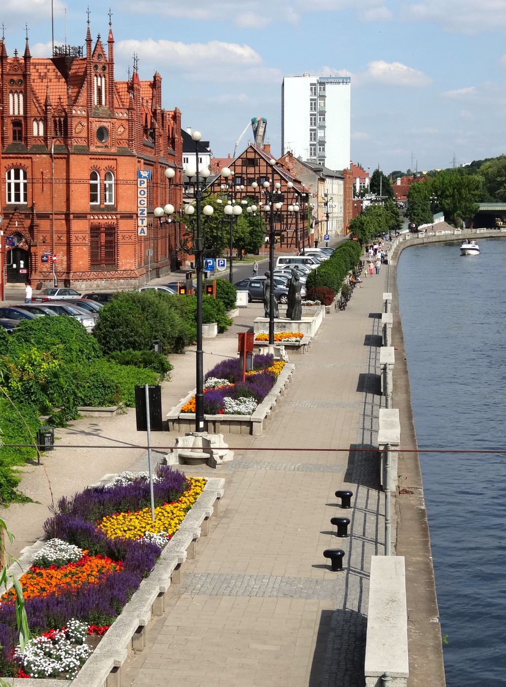 Północne nabrzeże Brdy w centrum Bydgoszczy - bulwar im. Zbigniewa Urbanyi